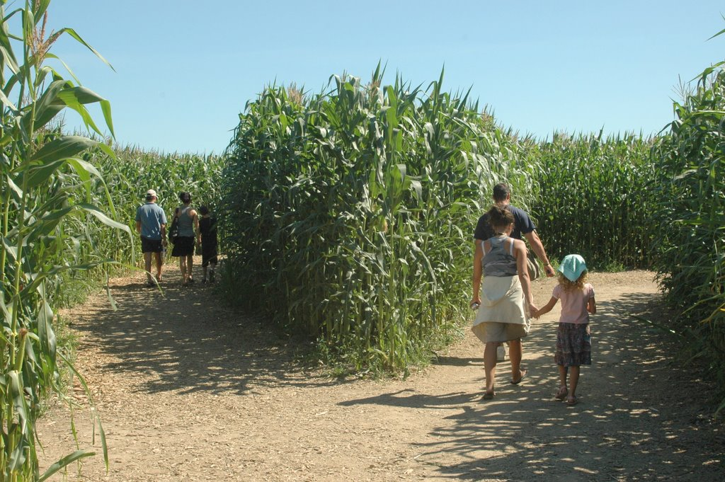 Le Labyrinthe de Durbuy à Barvaux-sur-Ourthe